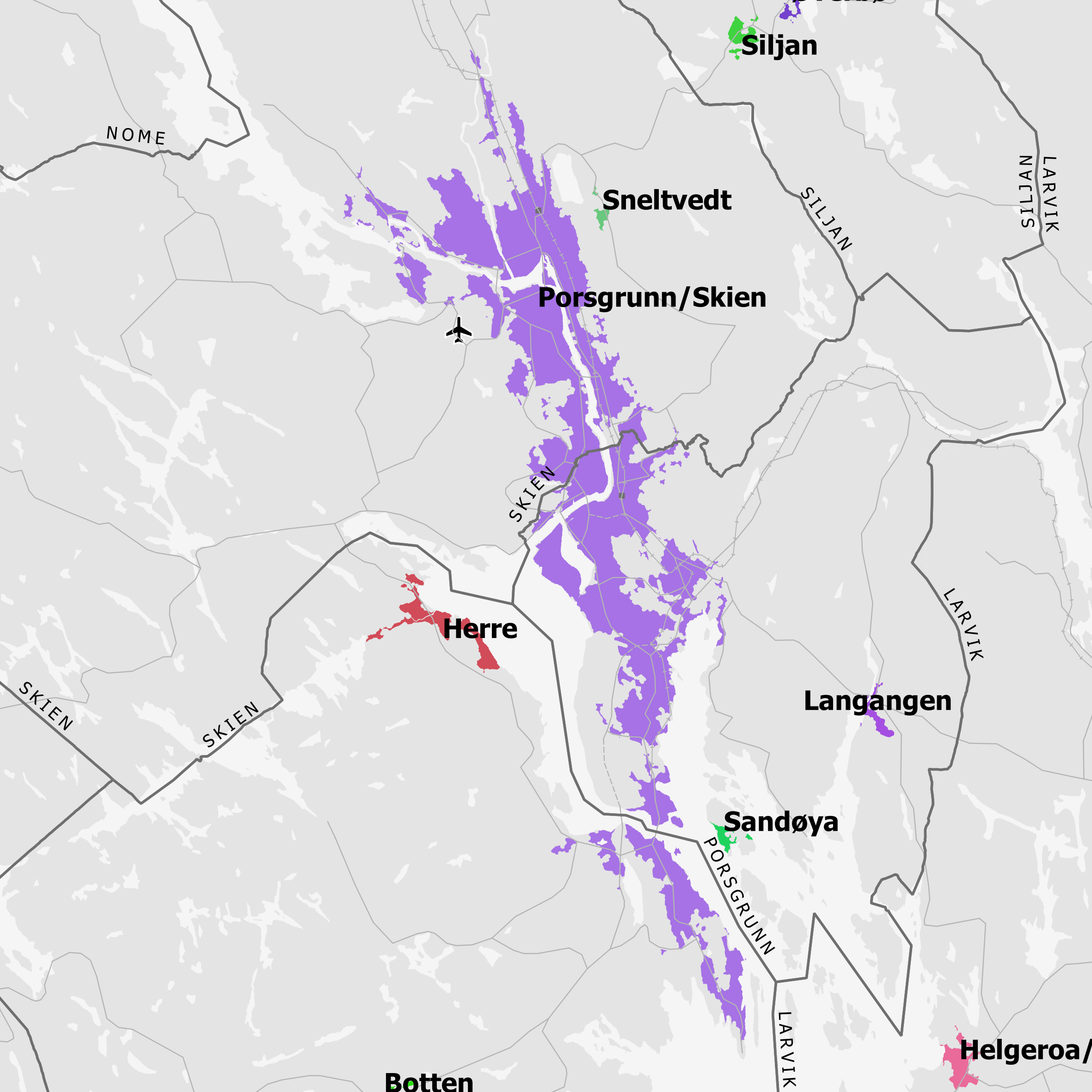 Tettsted 3005 Porsgrunn/Skien pr. 1.1.2018